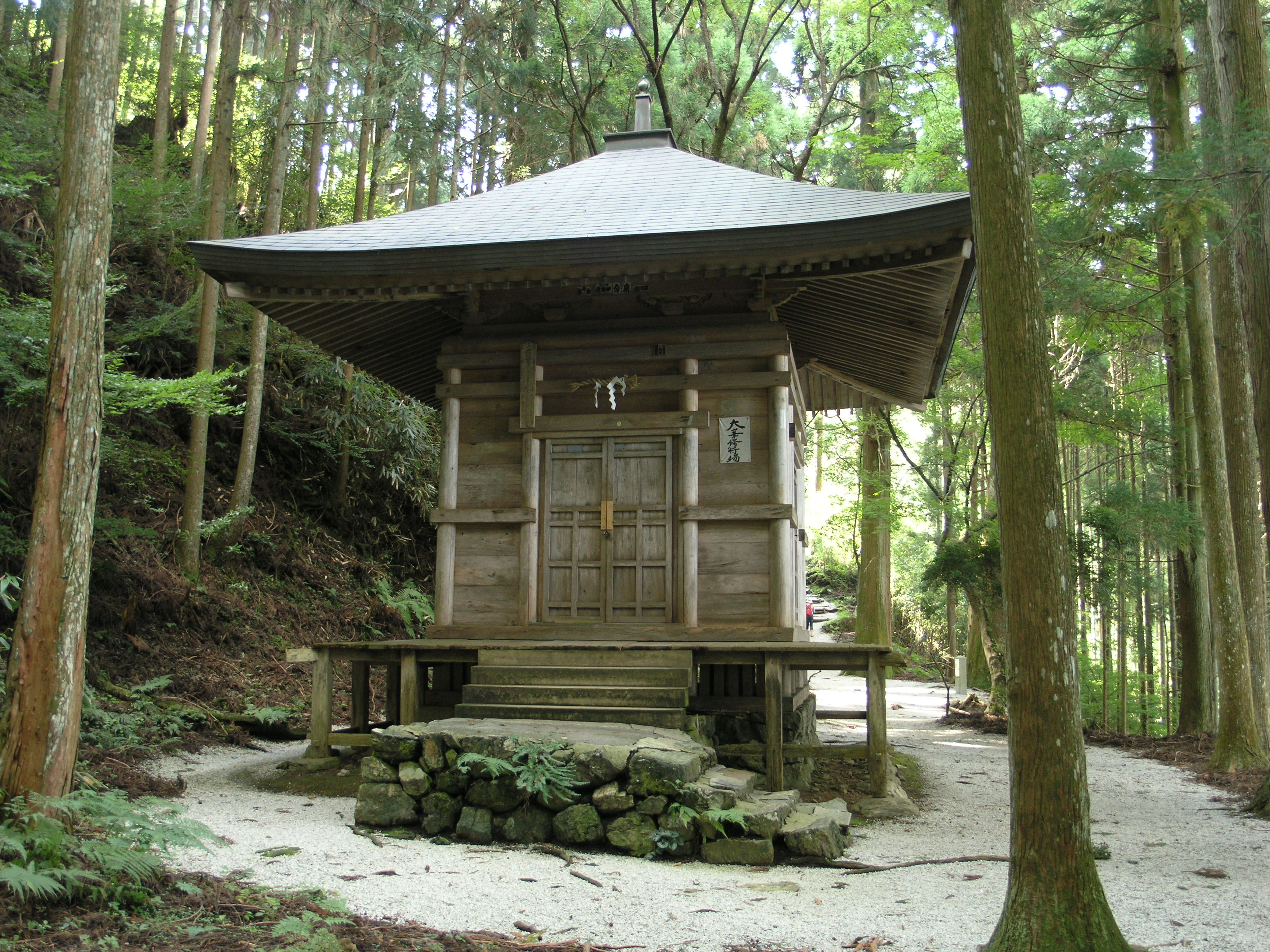 金峯神社 義経隠れ塔 (奈良県吉野郡吉野町) 2008年9月撮影。 機材：C8080WZ 撮影者：Kansai explorer